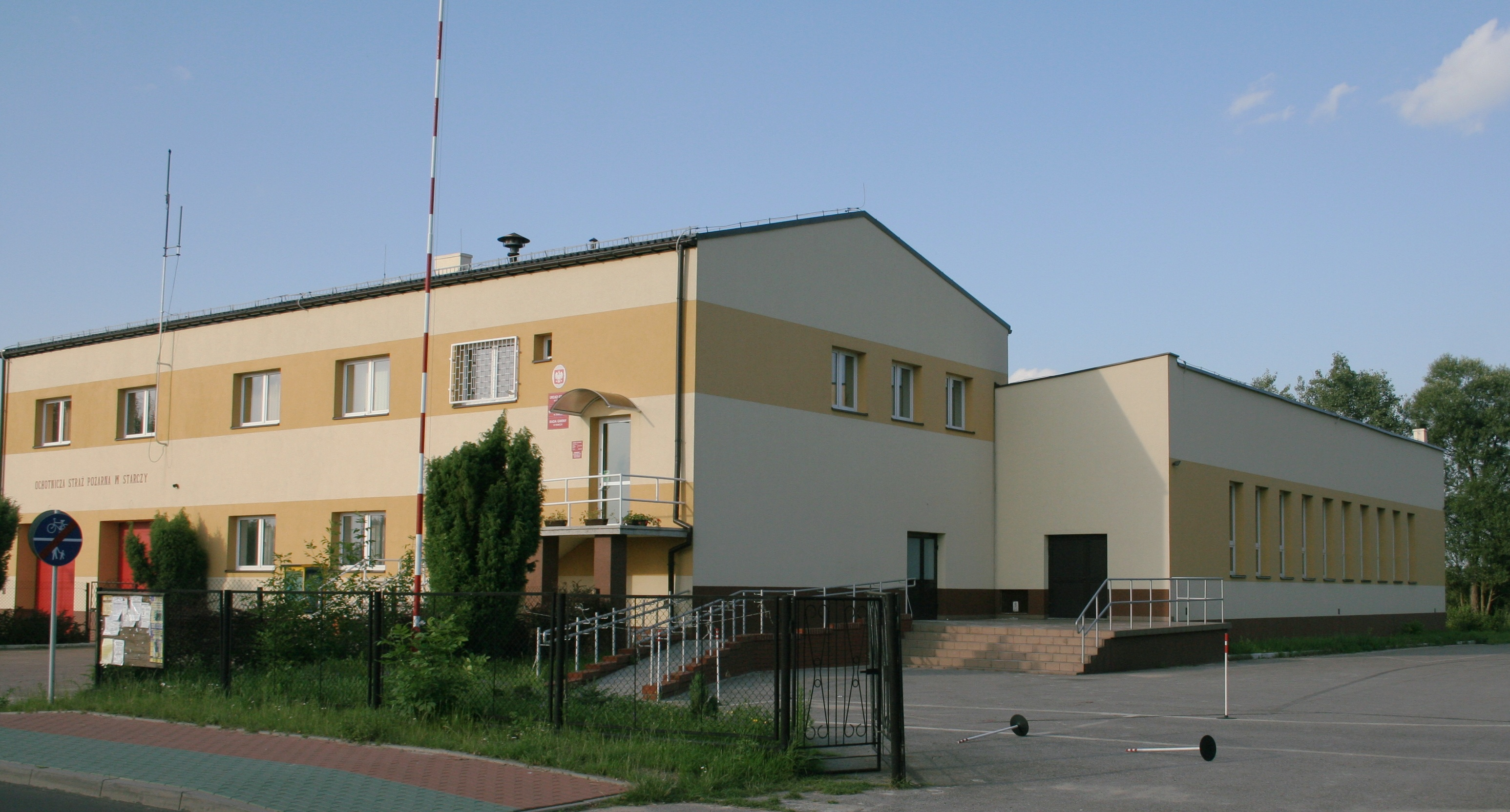 Urząd gminy w Starczy.